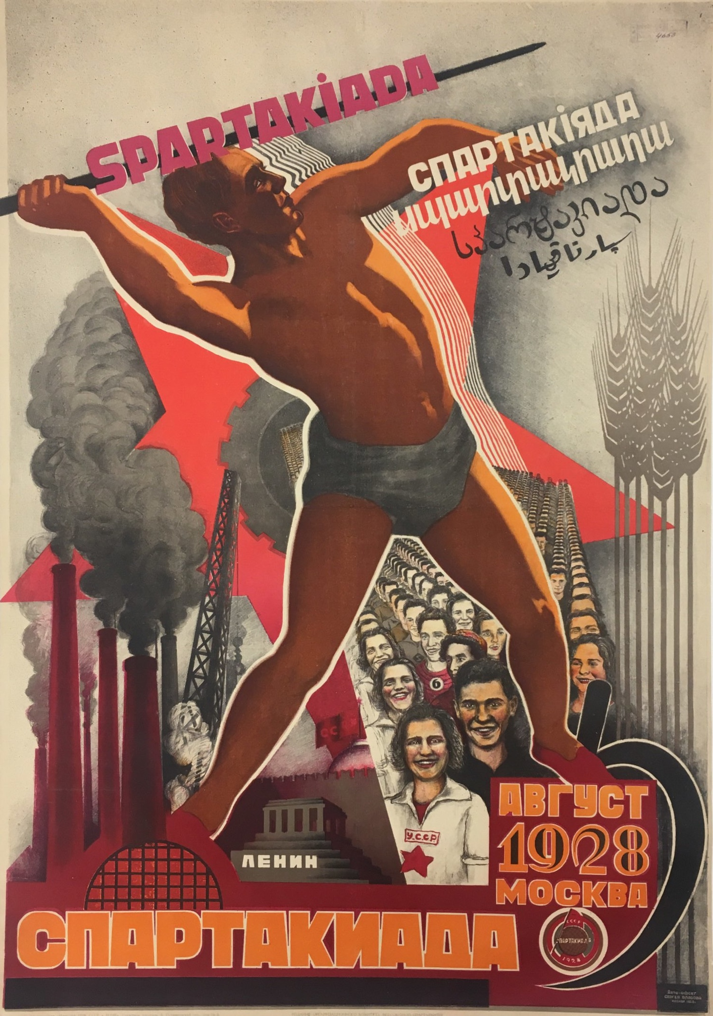 1928. Спартакиада, август 1928, Москва.jpg